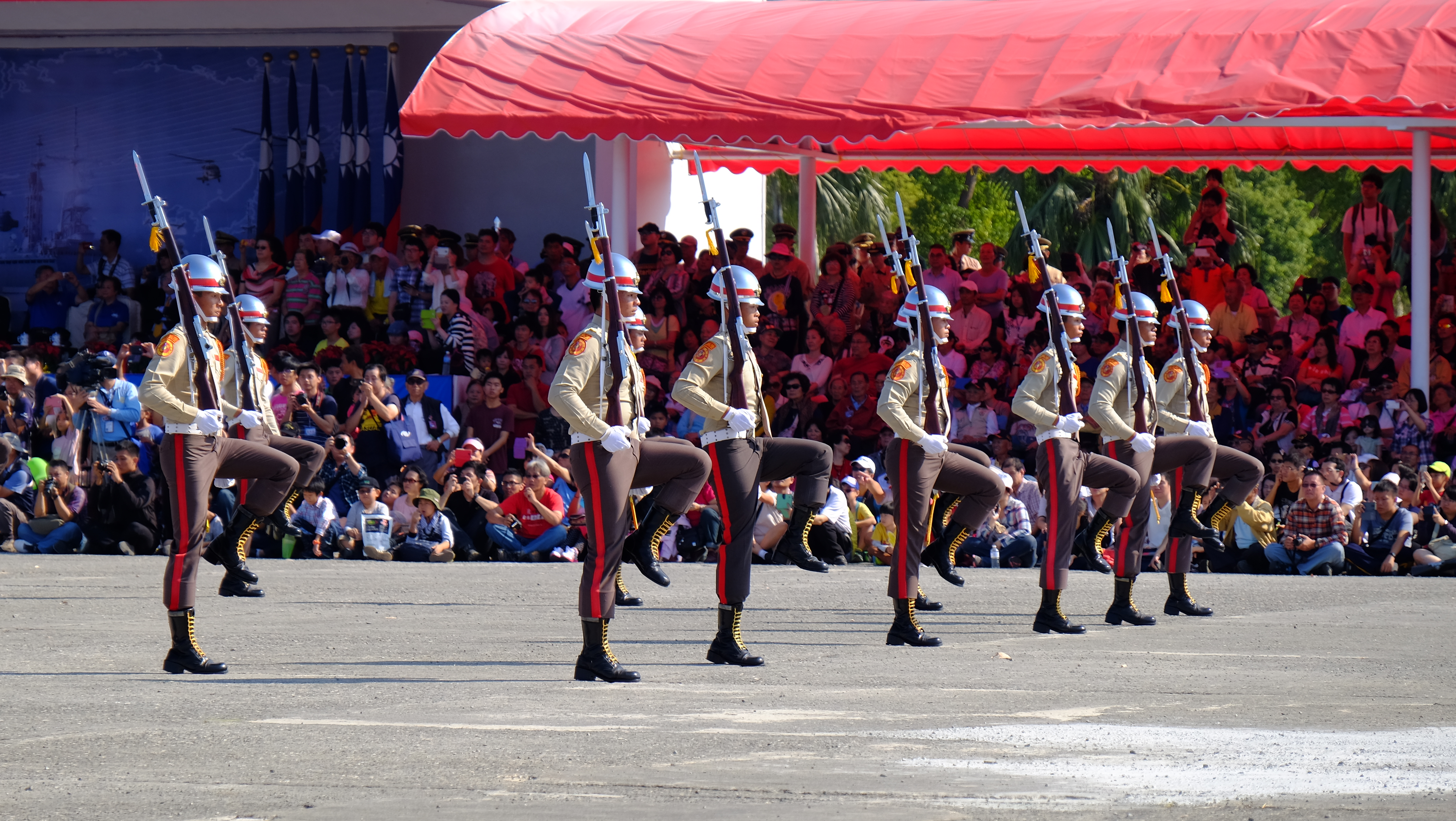 2014年左營軍港營區開放活動，開始操演行進的海軍陸戰隊儀隊。